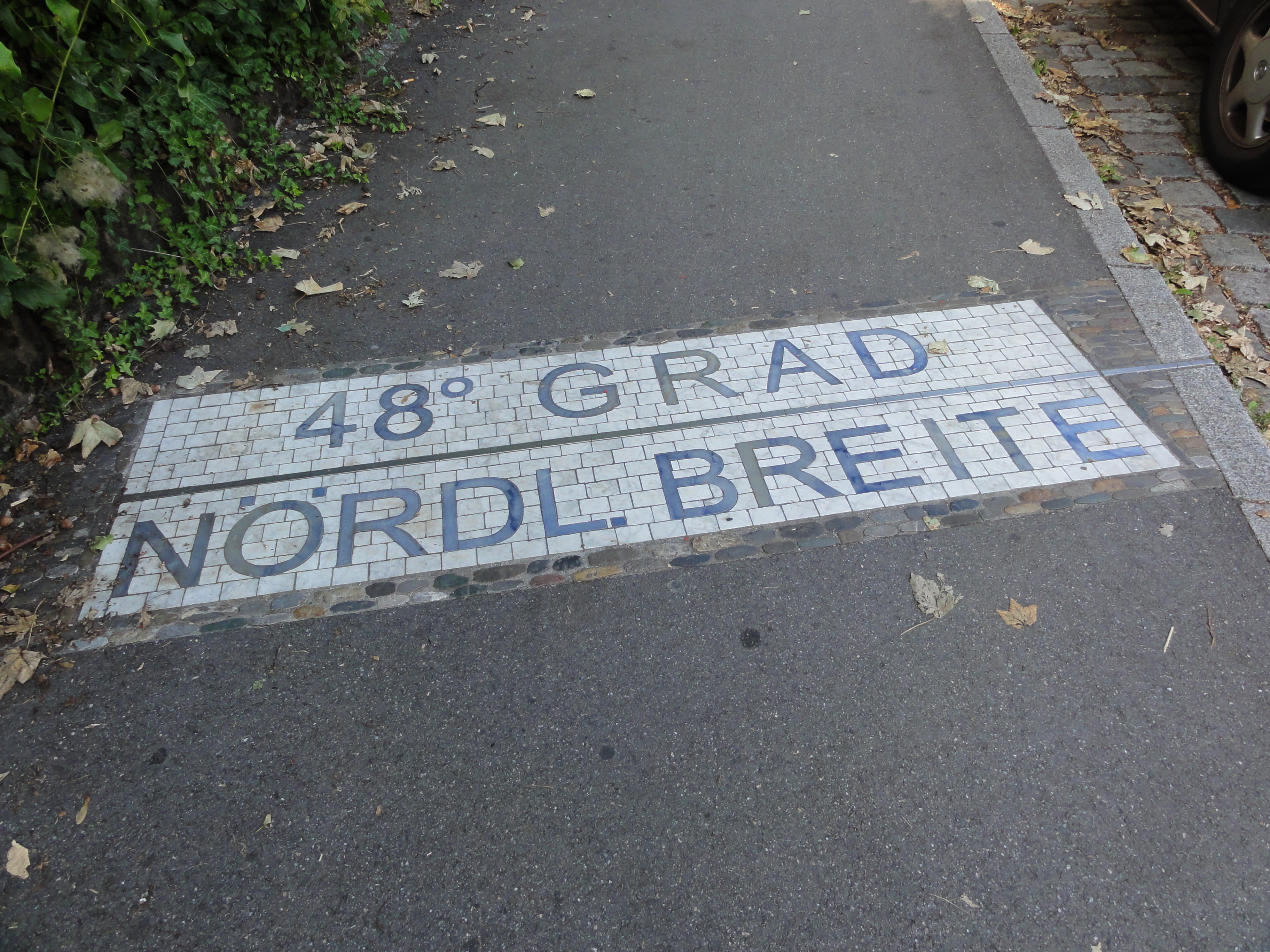 Germany, Freiburg im Breisgau, Habsburger Straße